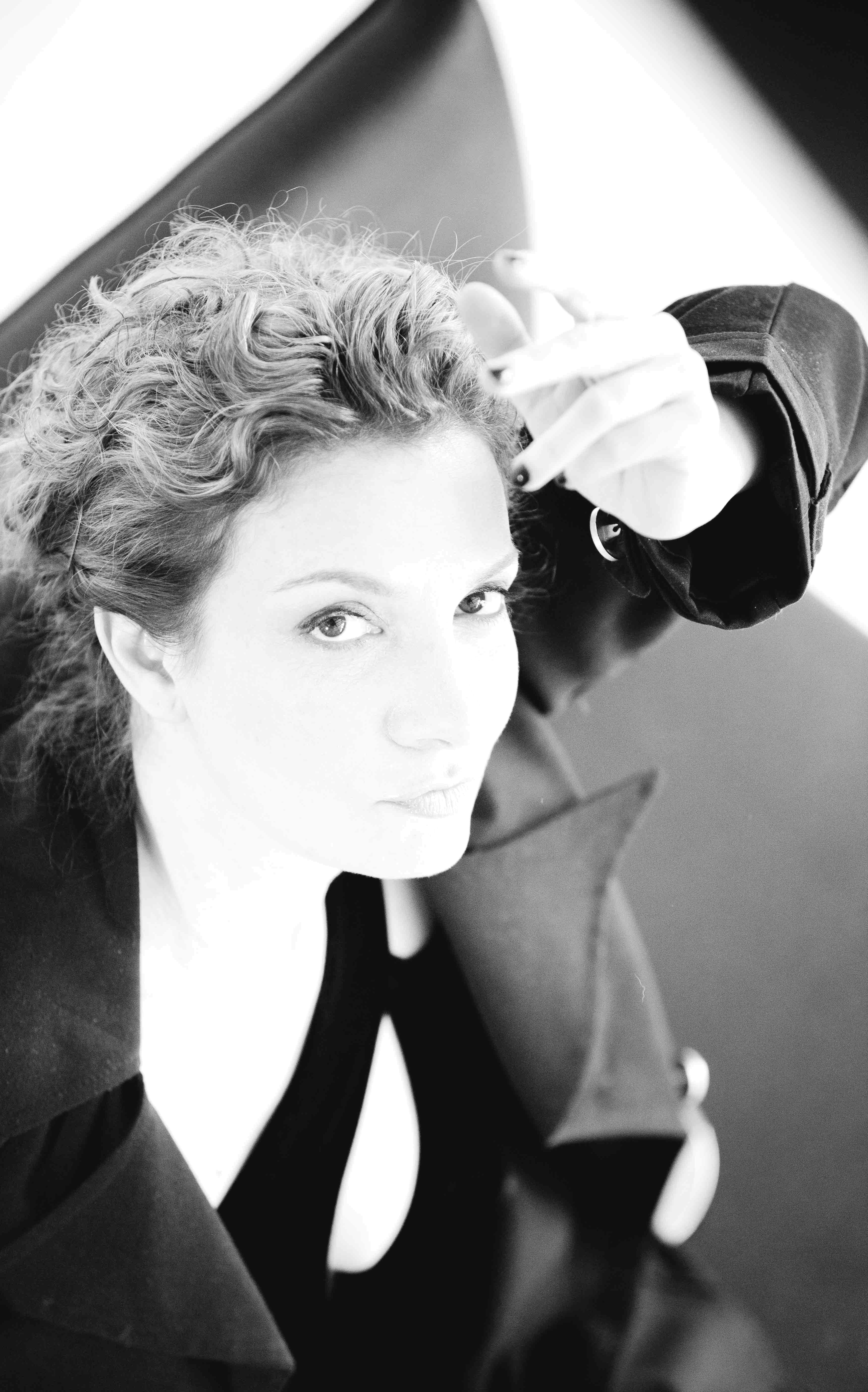 Sabrina Farji: directora, guionista y productora